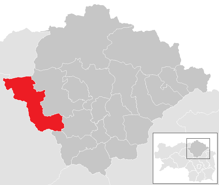 Lage von Tragöß-Sankt Katharein im Bezirk Bruck-Mürzzuschlag